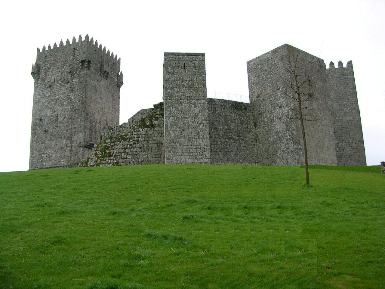 Vista do Castelo de Montalegre